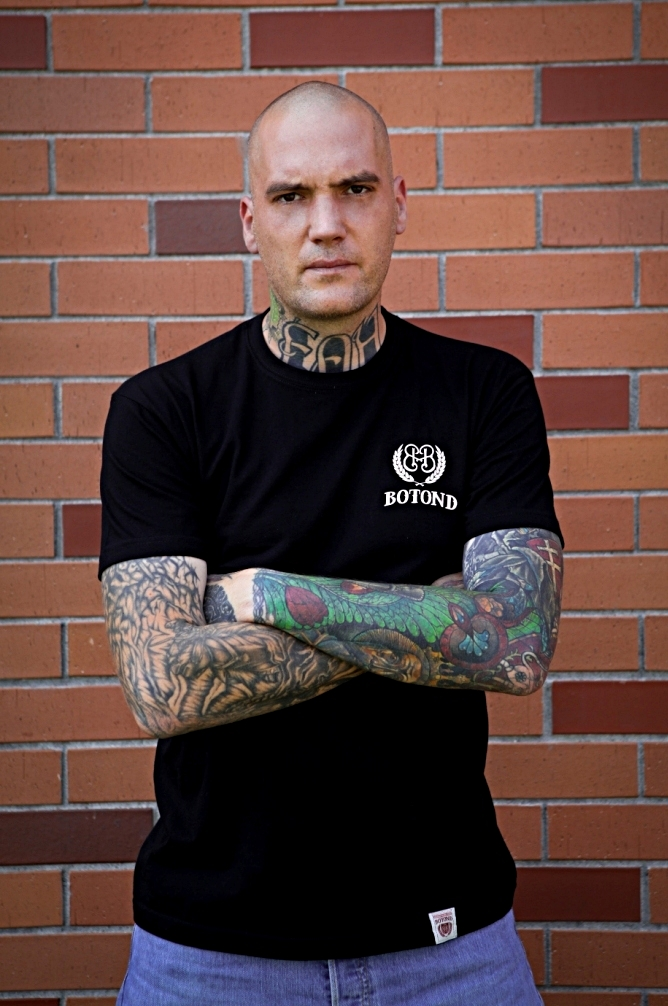 A Romantikus Erőszak frontembere 2012-ben.